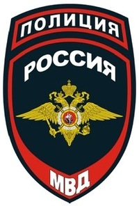 Полиция России